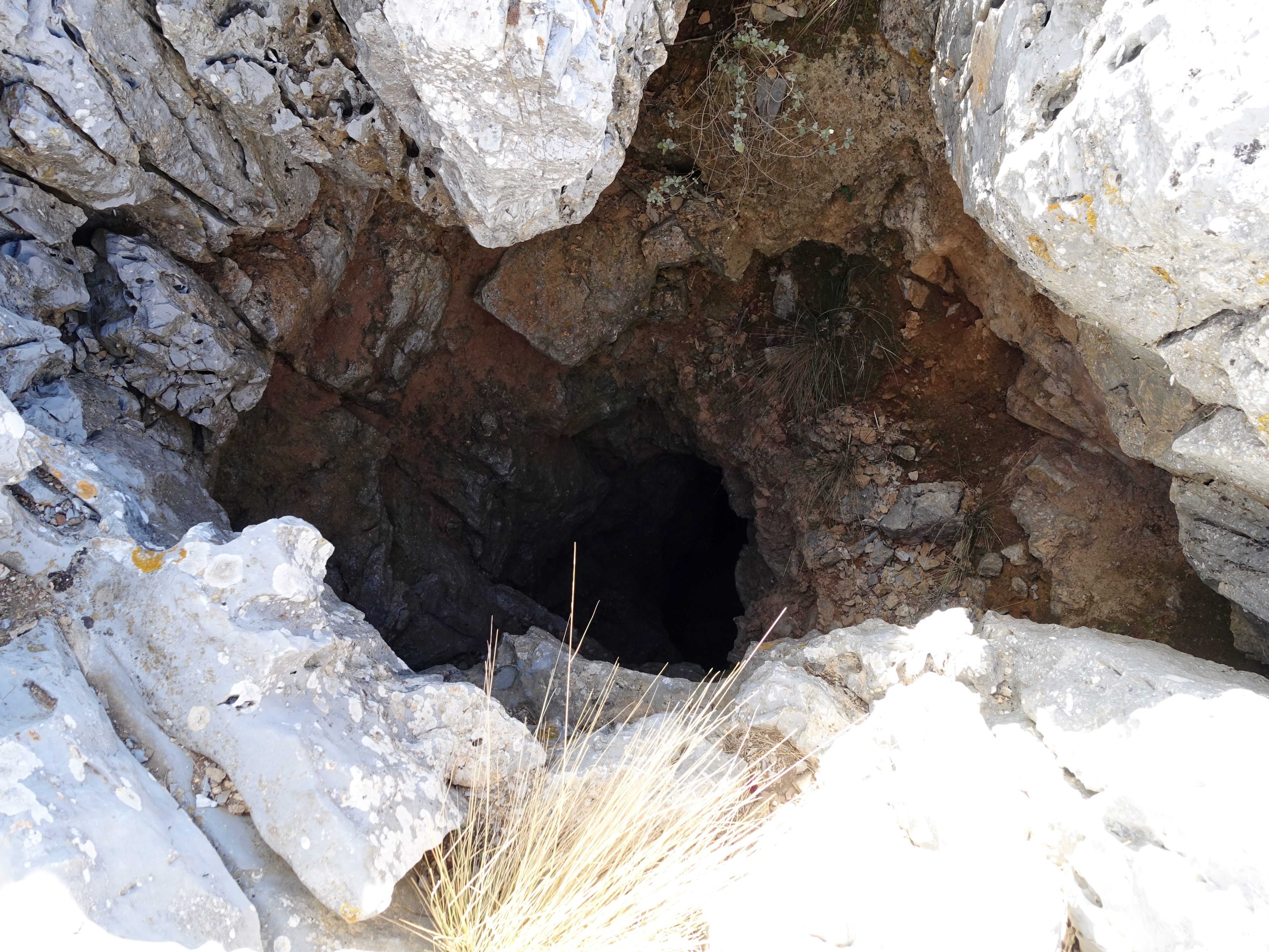 Minoisches Gipfelheiligtum auf dem Giouchtas (Γιούχτας), Kreta, Griechenland